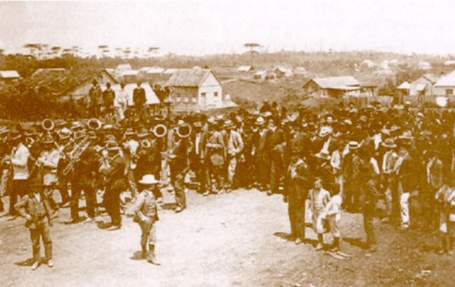 Chegada de Giuseppe di Stefano Paternó a Caxias do Sul